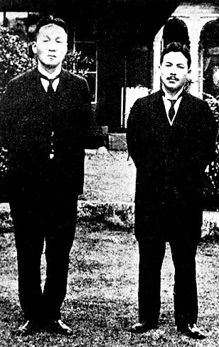 Kim Seong-soo and Song Jin-woo